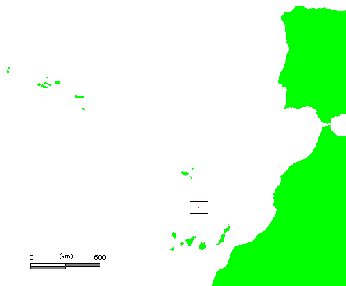 PT Selvagens.PNG (Savage Islands)